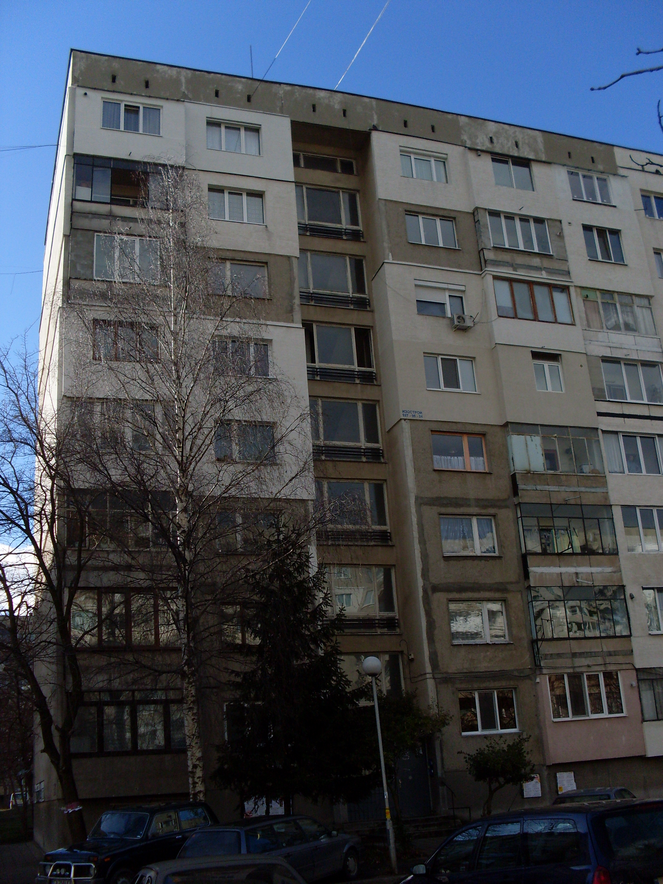 Едропанелна жилищна сграда по номенклатура Бс-69-Сф, построена преди 1977 г. Секция 222, предна фасада.